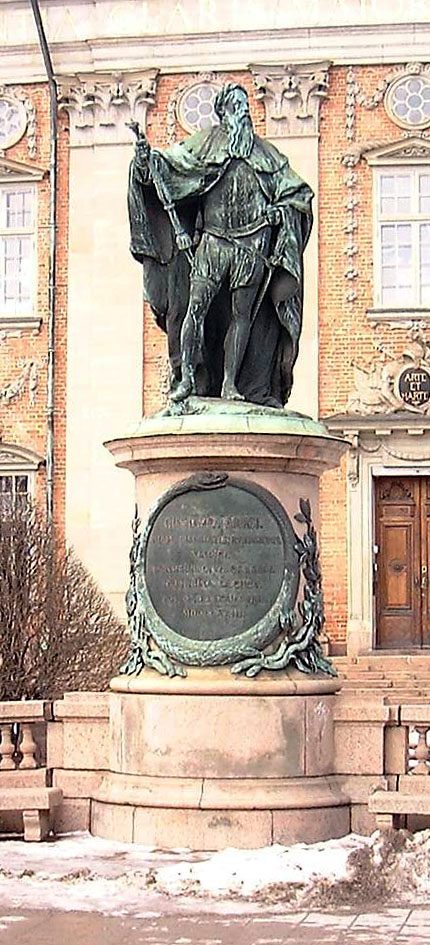 Statue of Gustav Vasa standing in front of Riddarhuset, Stockholm.